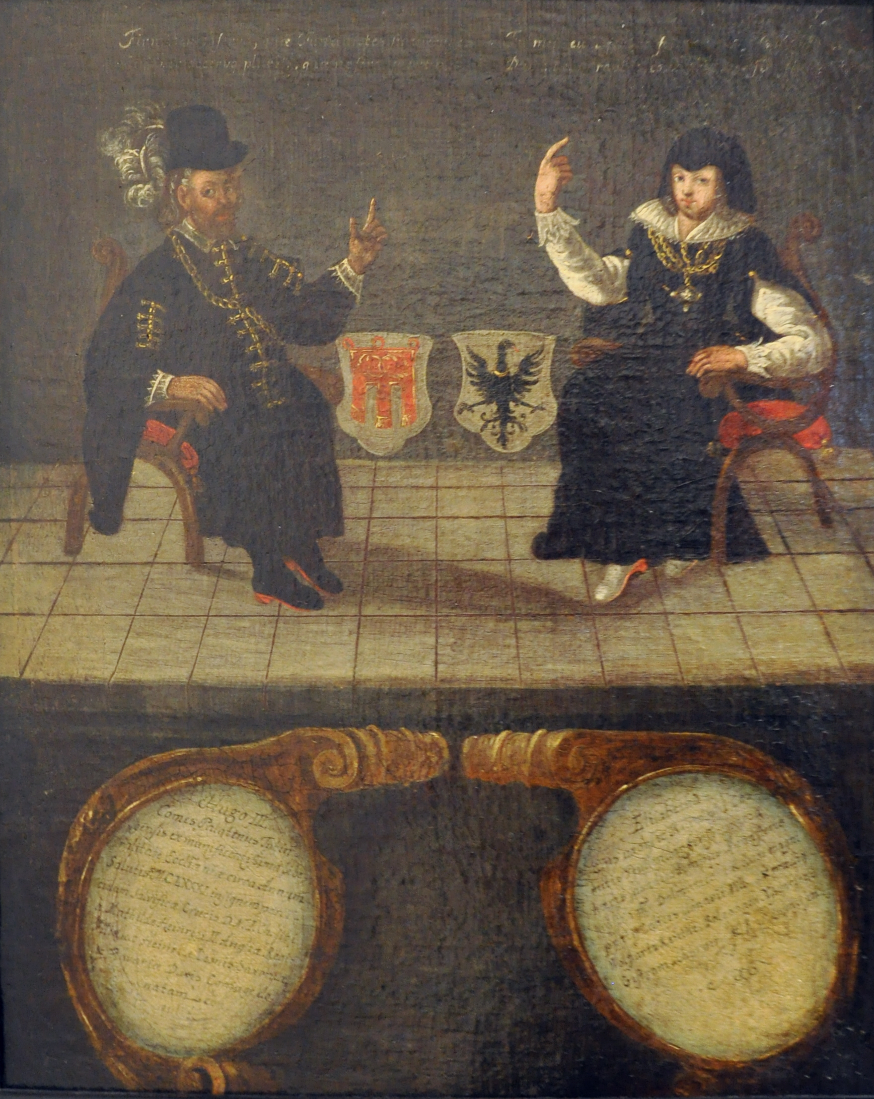 Pfalzgraf Hugo II. von Tübingen, mit Ehefrau Elisabetha; Öl auf Leinwand, 17. Jahrhundert Vorarlberg museum Native namevorarlberg museumLocationBregenz, Vorarlberg, AustriaCoordinates47° 30′ 15.84″ N, 9° 44′ 48.01″ E Established1857Web pageVorarlberg Museum websiteAuthority control : Q2533480 VIAF: 124303291 ISNI: 0000 0001 2242 622X LCCN: n50051186 GND: 18871-2 SUDOC: 030717523 WorldCat institution QS:P195,Q2533480